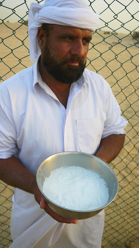 Lait de chamelle frais à Dubaï, Émirats arabes unisUnknown